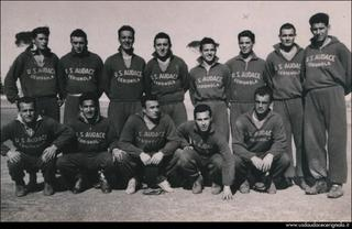 Foto Audace Cerignola